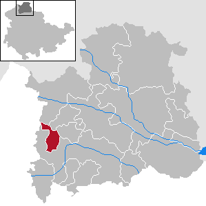 Gemeinde Lipprechterode in Thüringen, Landkreis Nordhausen